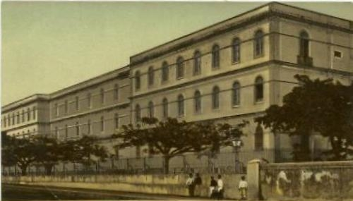 Hospital Pedro II em foto do ano de 1910 - Recife, Pernambuco, Brasil